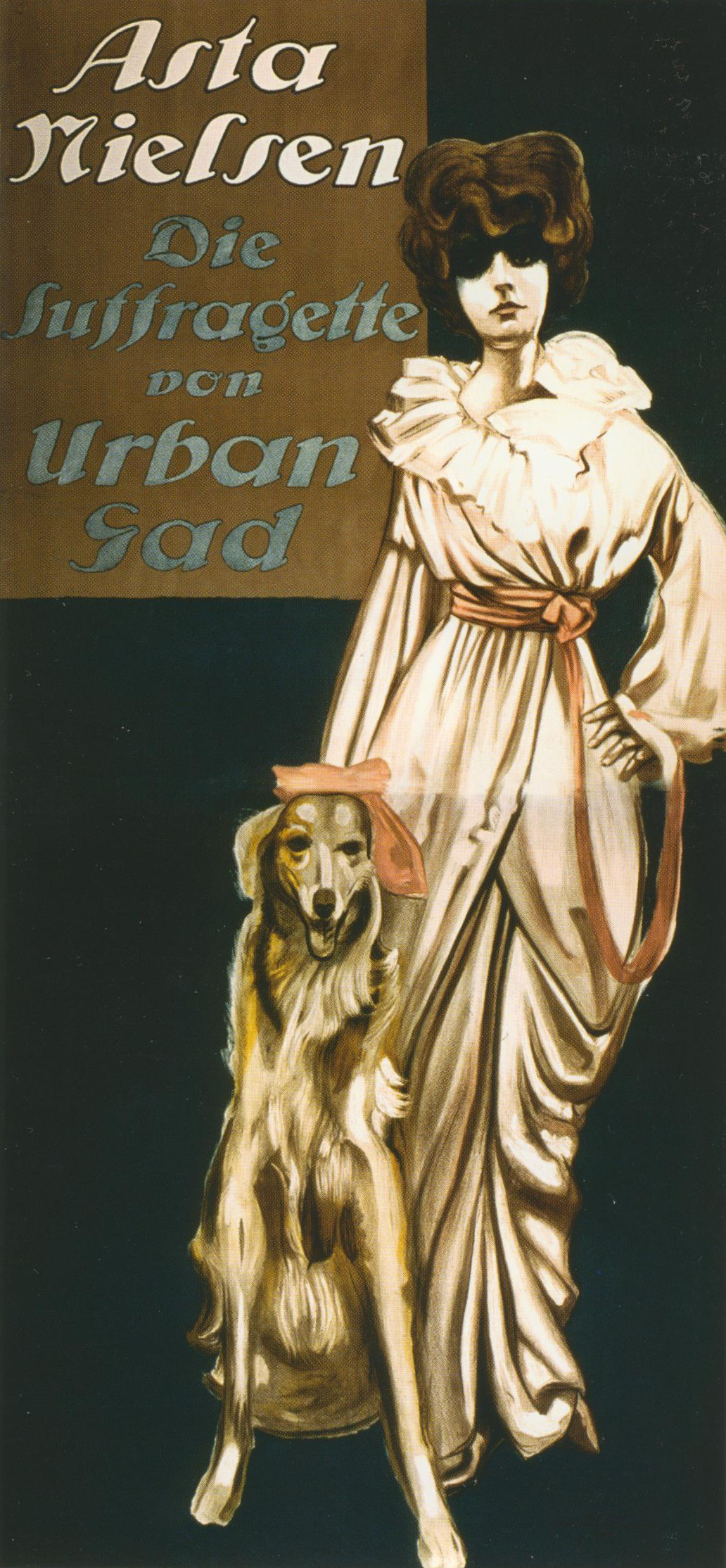 Filmposter zu Urban Gads Die Suffragette (1913), gezeichnet von Ernst Deutsch-Dryden; Hauptrolle Asta Nielsen, neben ihr ein Barsoi.